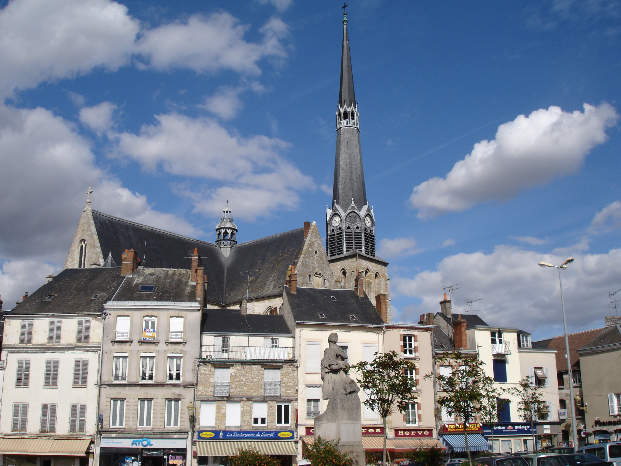 La place du Martroi à Pithiviers (Loiret, France) et l'église Saint-Salomon-et-Saint-Grégoire.